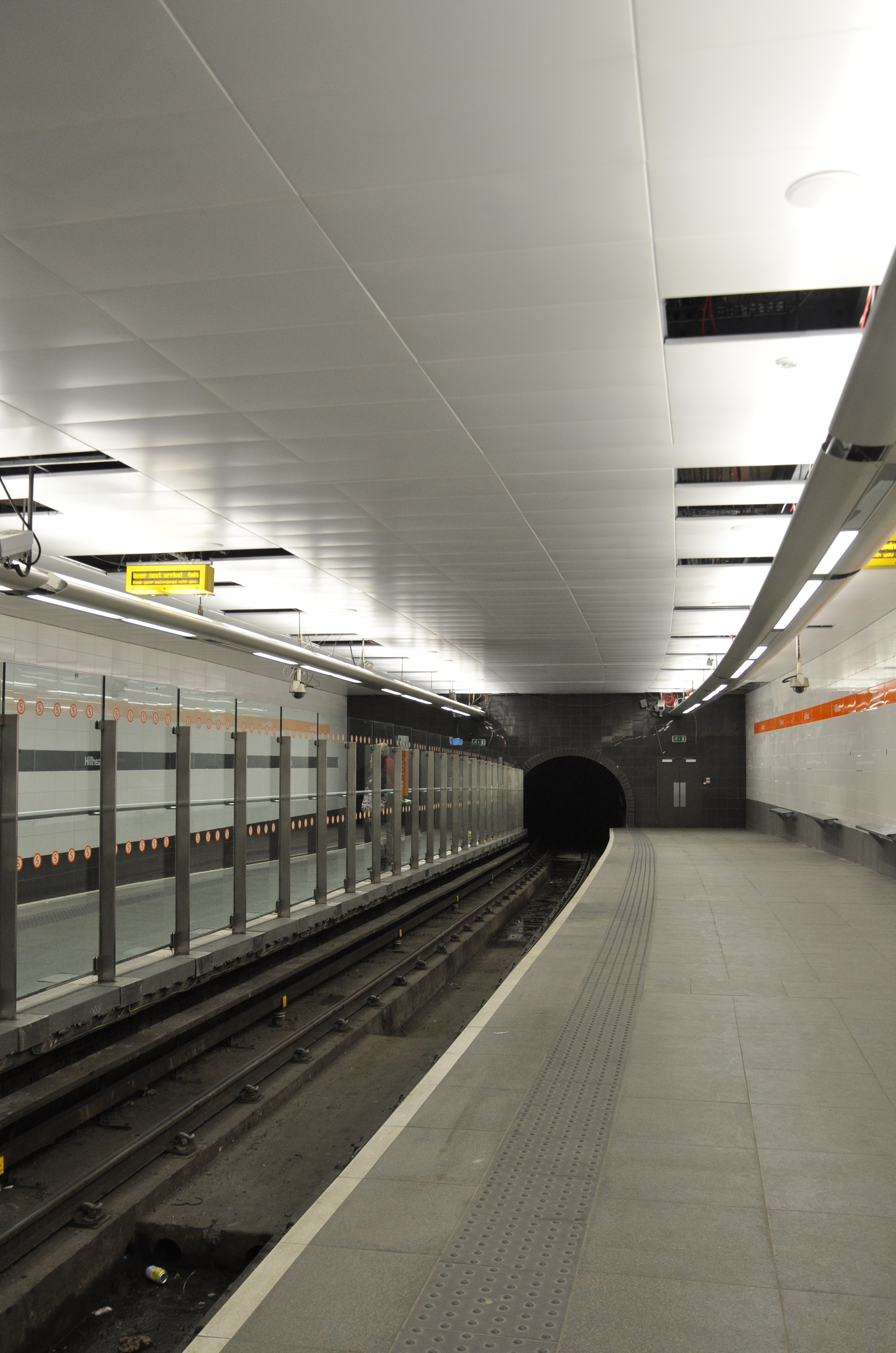 Hillhead station, Glasgow tunnelbana